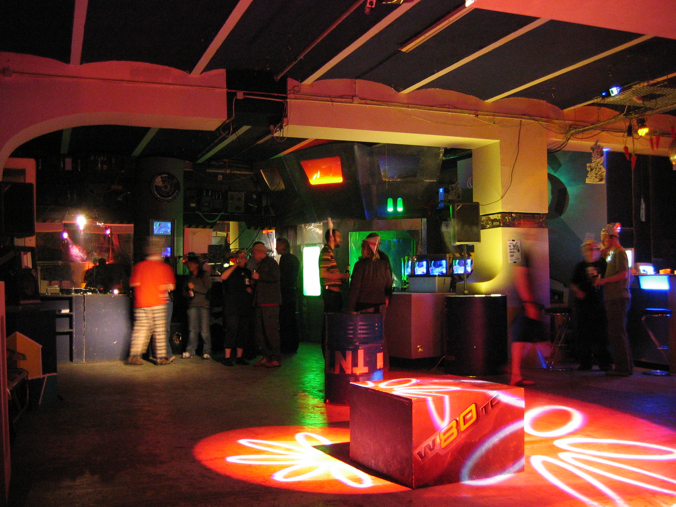 spectáculo en la c-base